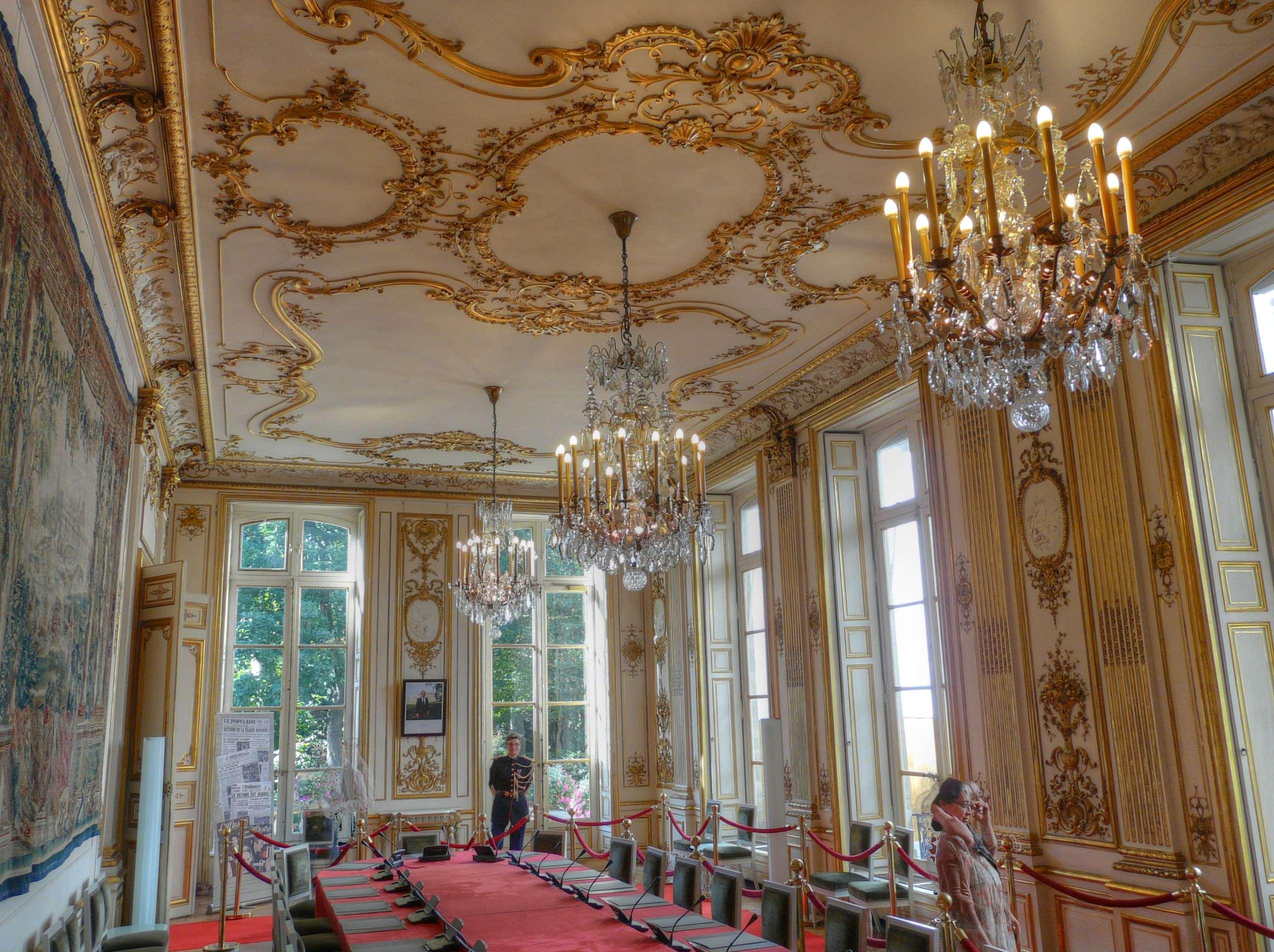 Hotel de Matignon, salle du conseil